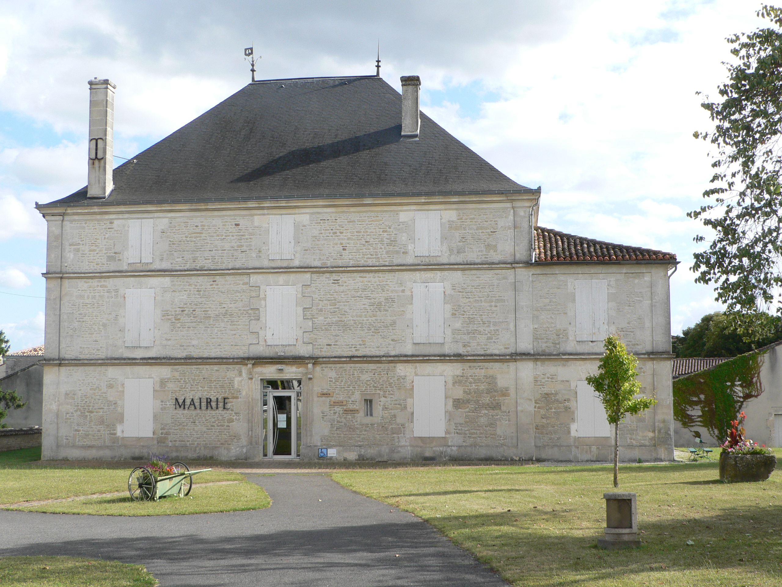 Mairie (Hiersac, Charente)